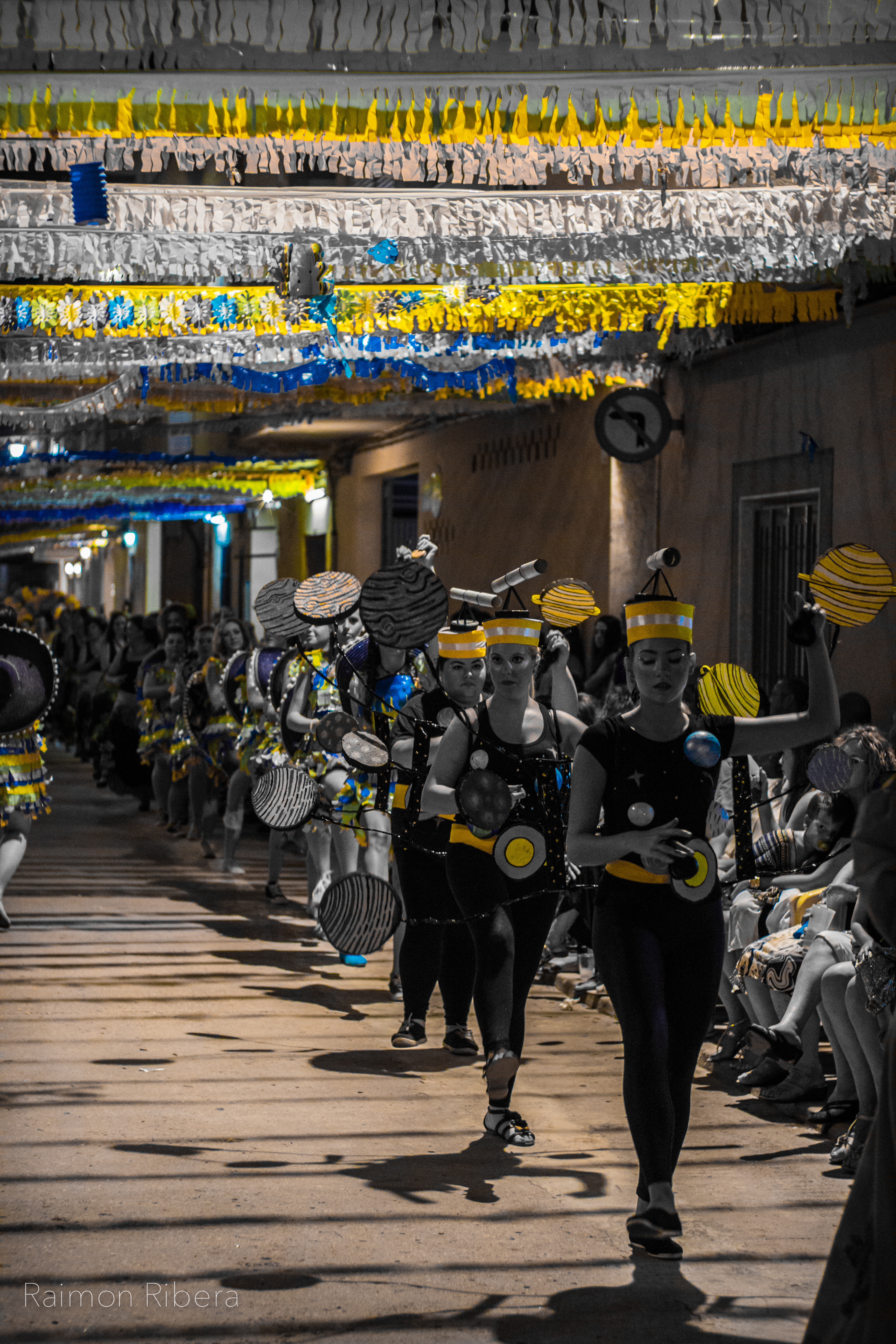 Danses de Guadassuar 2015